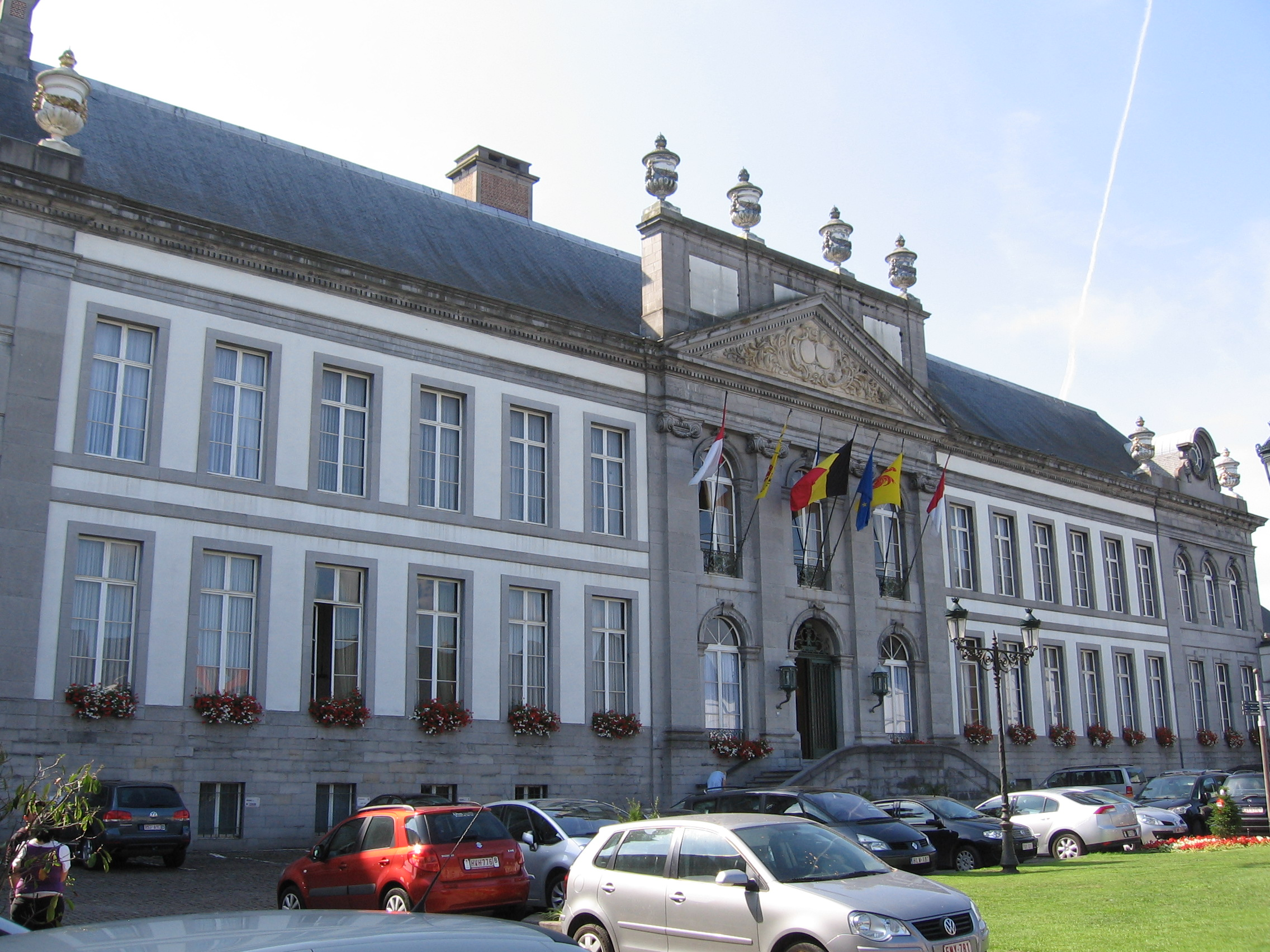 Le palais abbatial de l'ancienne abbaye Saint-Martin, devenu Hôtel de ville de Tournai au XIXe siècle